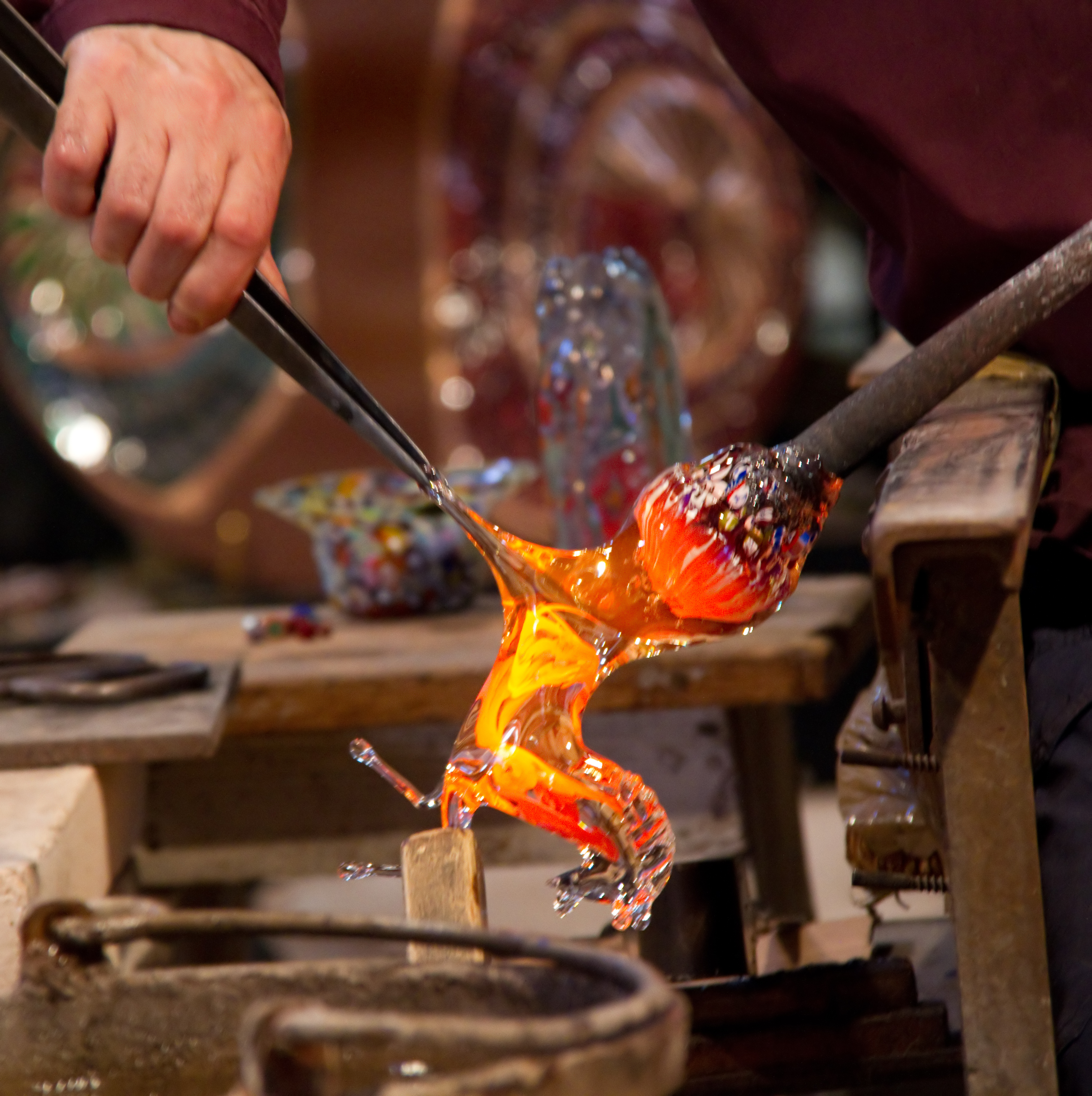 Murano glass